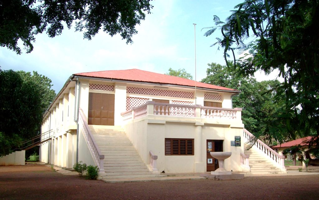 le musée de Natitingou abrité par un batment de 97 ans qui a servi de gouvernorat